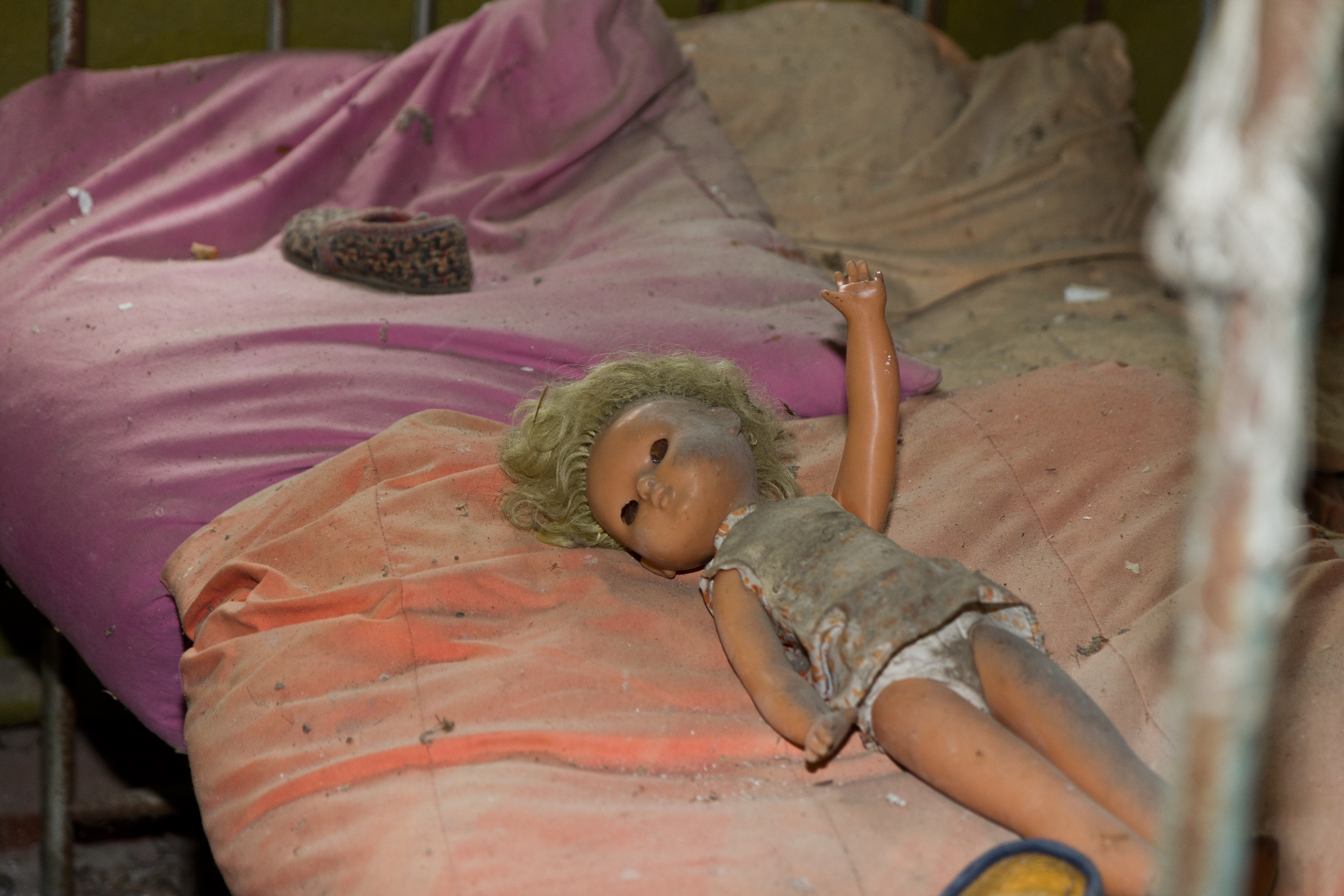 Kopatschi - Wegen der Nuklearkatastrophe von Tschernobyl 1986 verlassenes Dorf innerhalb der "Verbotenen Zone" um das ehemalige Kernkraftwerk Tschernobyl in der Ukraine